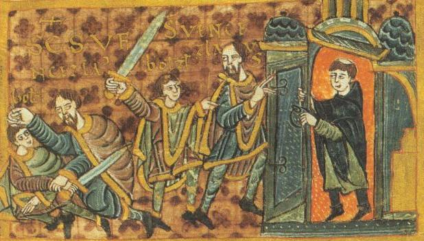 Vita des hl. Wenzel. Ermordung Wenzels durch seinen Bruder Boleslaw. Wolfenbüttel, Herzog August Bibliothek, Guelf. 11,2 Augusteus 4, fol. 21r.